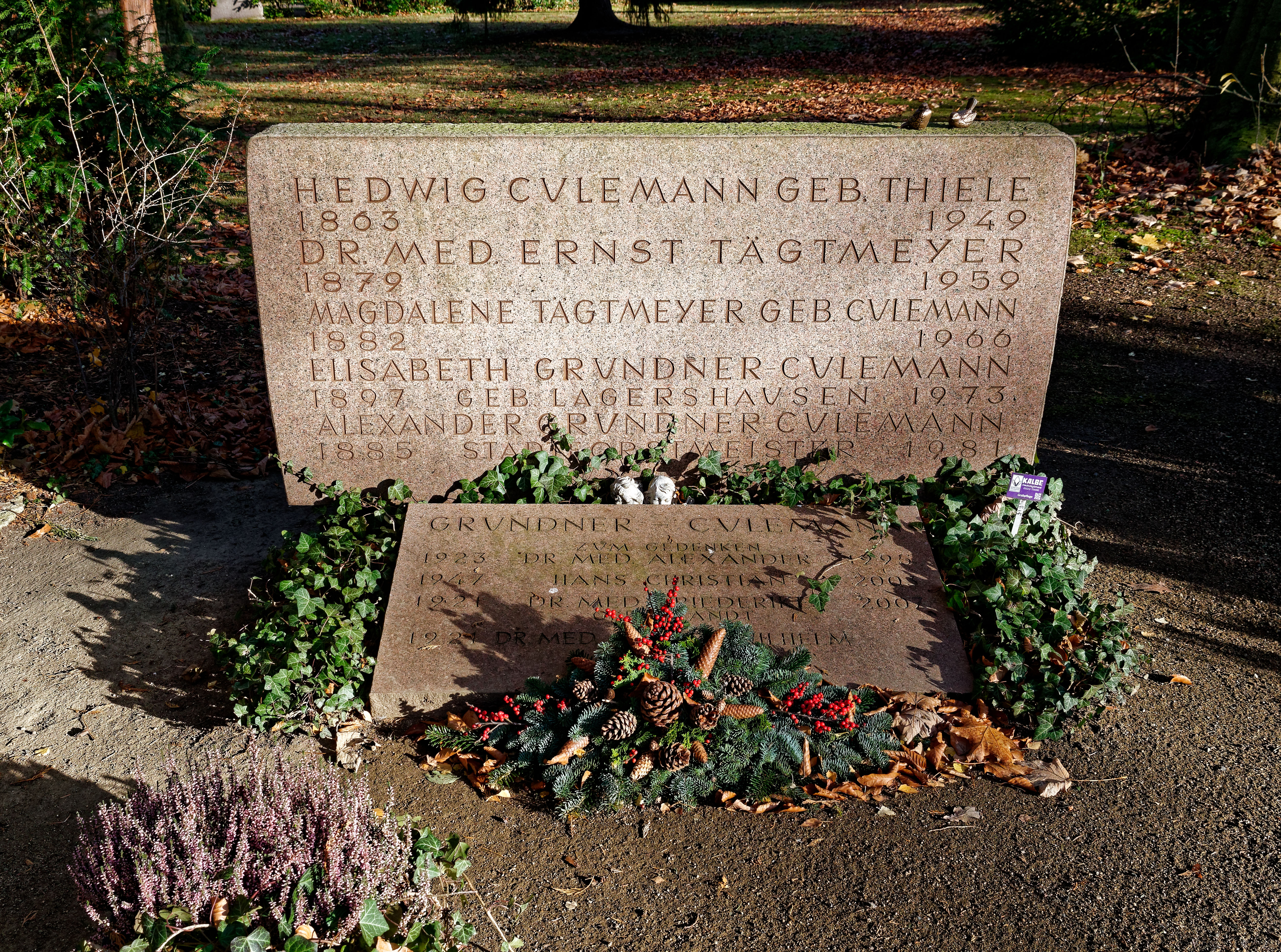 Grab von Alexander Grundner-Culemann auf dem Alten Friedhof in Goslar